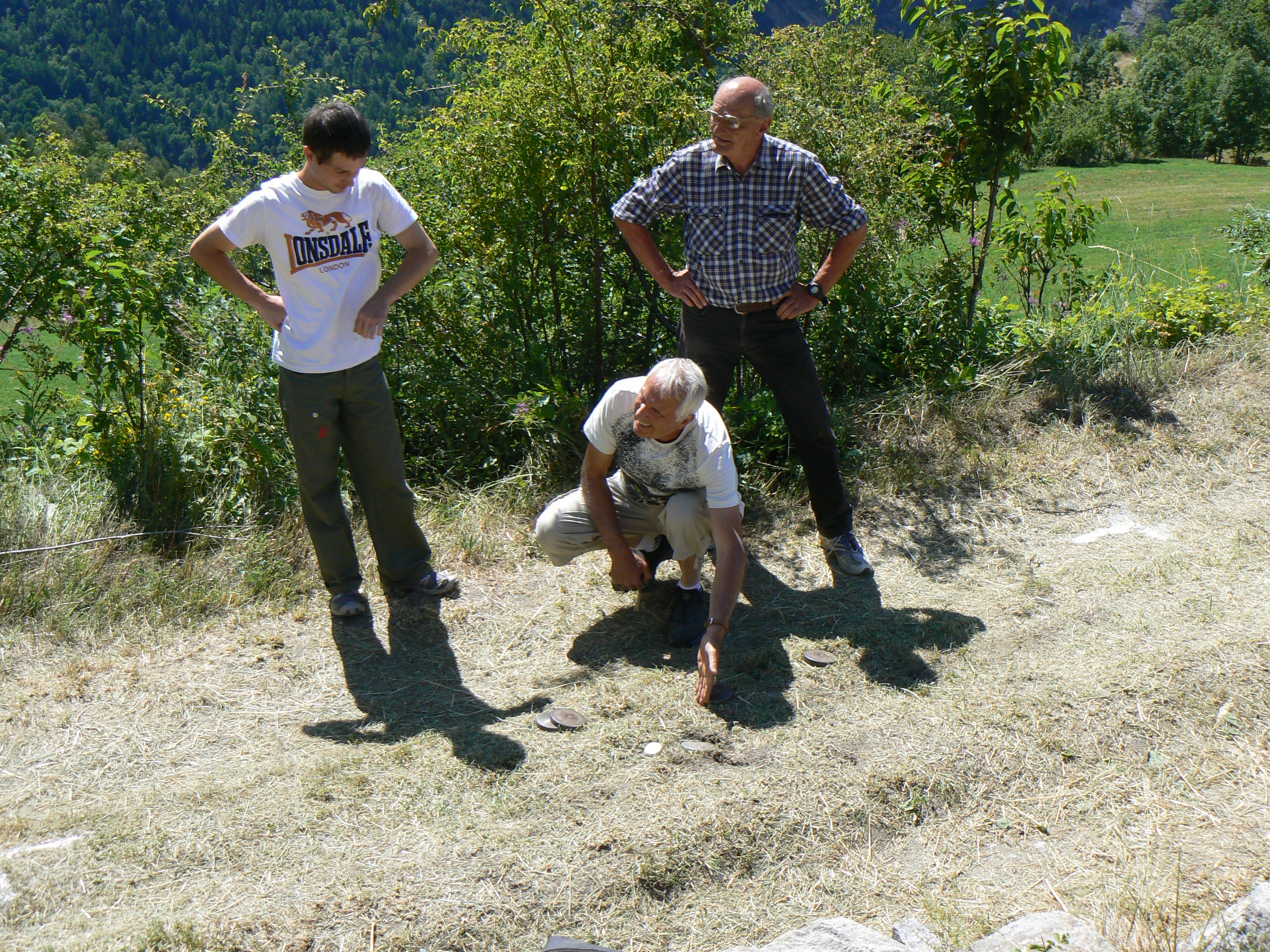 Giocatori aspettano l'arrivo del palet indicando la posizione del boccino al lanciatore. Partita di palet valdostano "a baraonda" durante la Festa della Favò 2012 nella frazione di Ozein, Aymavilles, Valle d'Aosta, Italia.